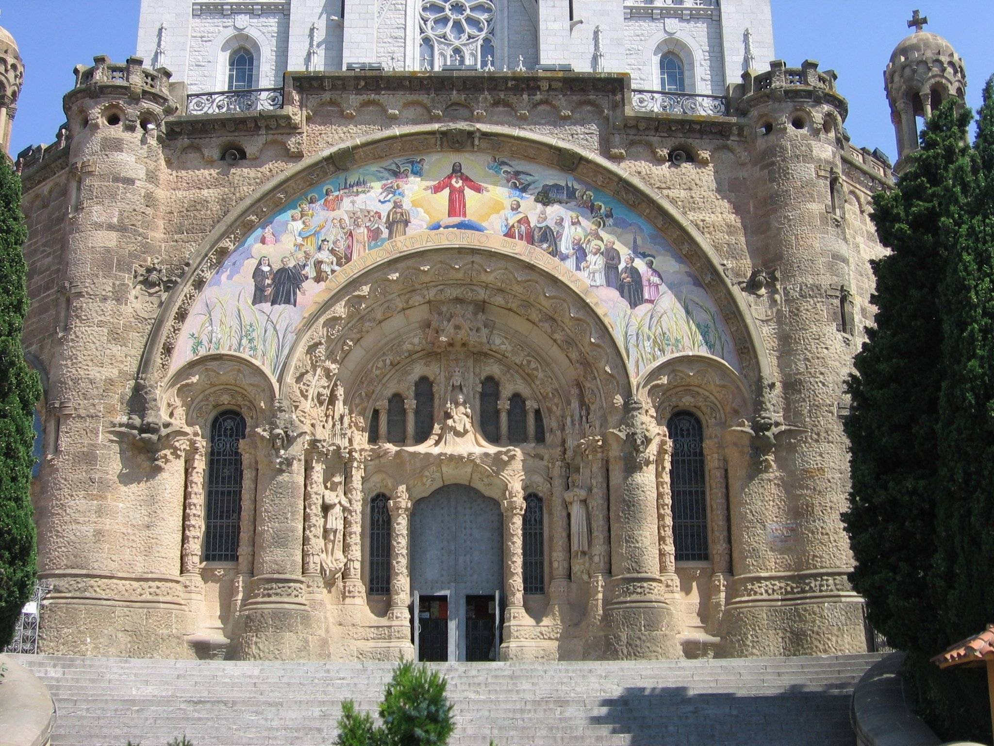 Templo Expiatorio del Sagrado Corazón, pórtico de la cripta